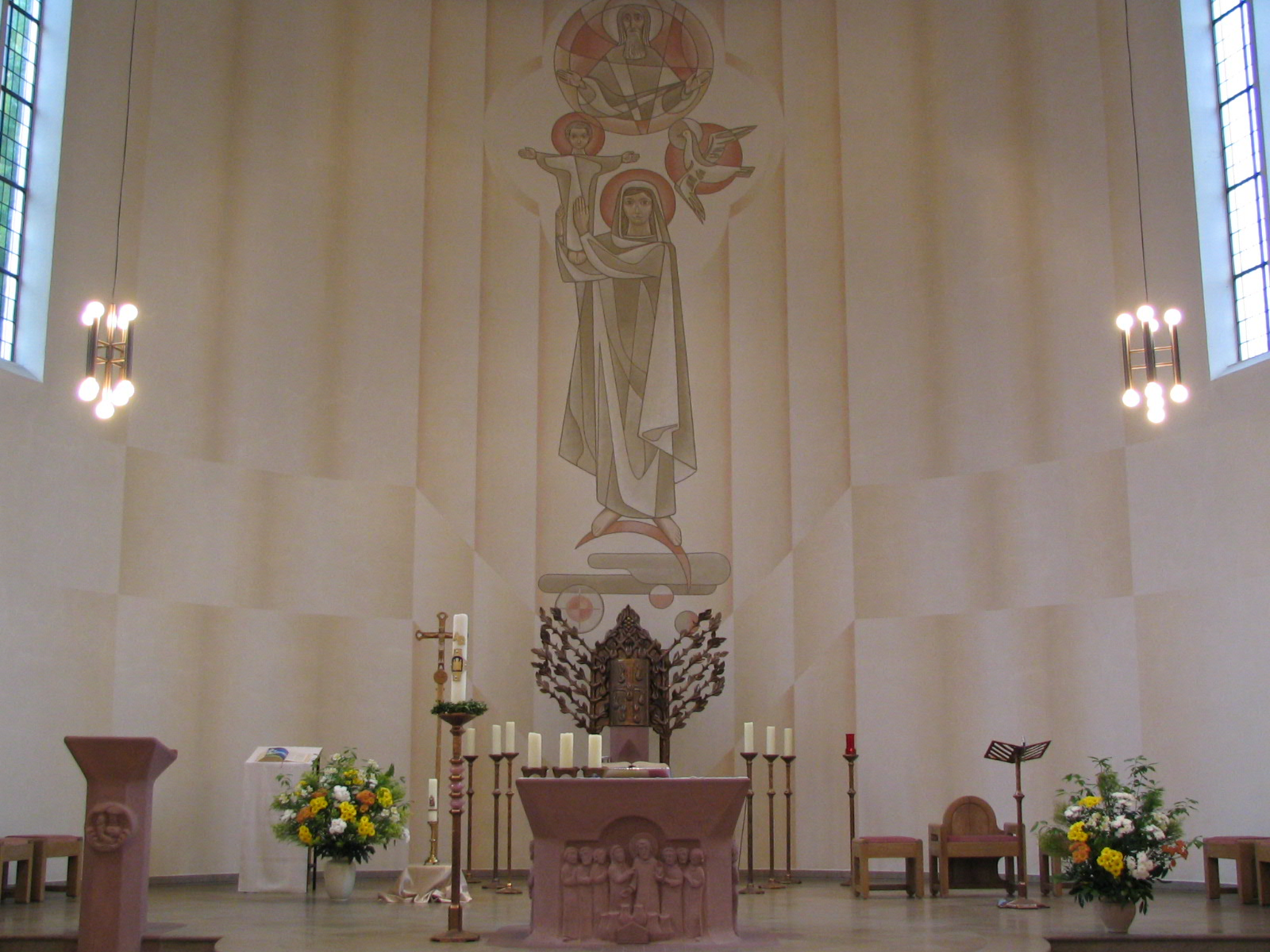 St. Marien, Leer-Loga, Ostfriesland, Deutschland